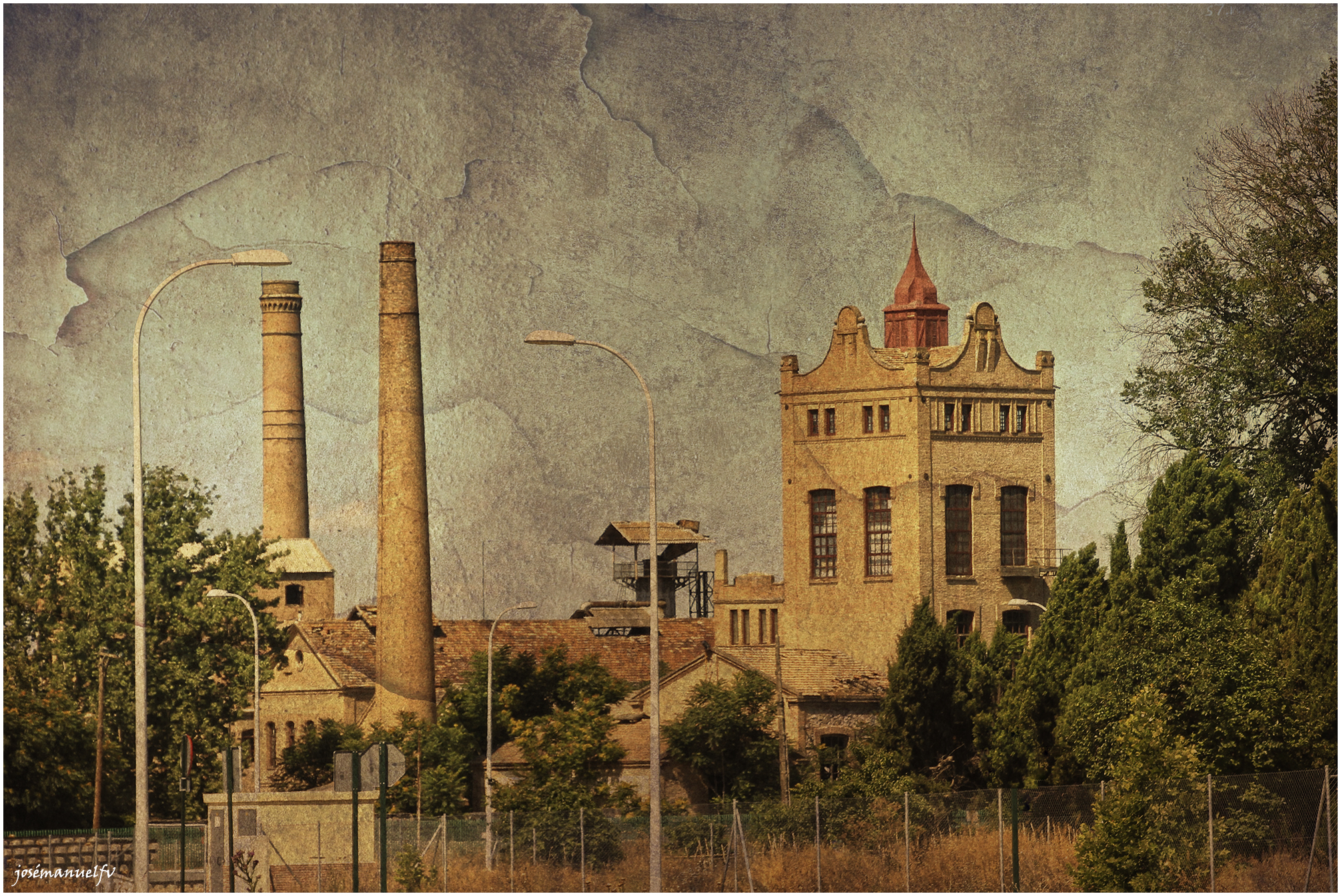 Azucarera de San Isidro, Granada, 1901-1984. Patrimonio Inmueble de Andalucía, código 01180870304